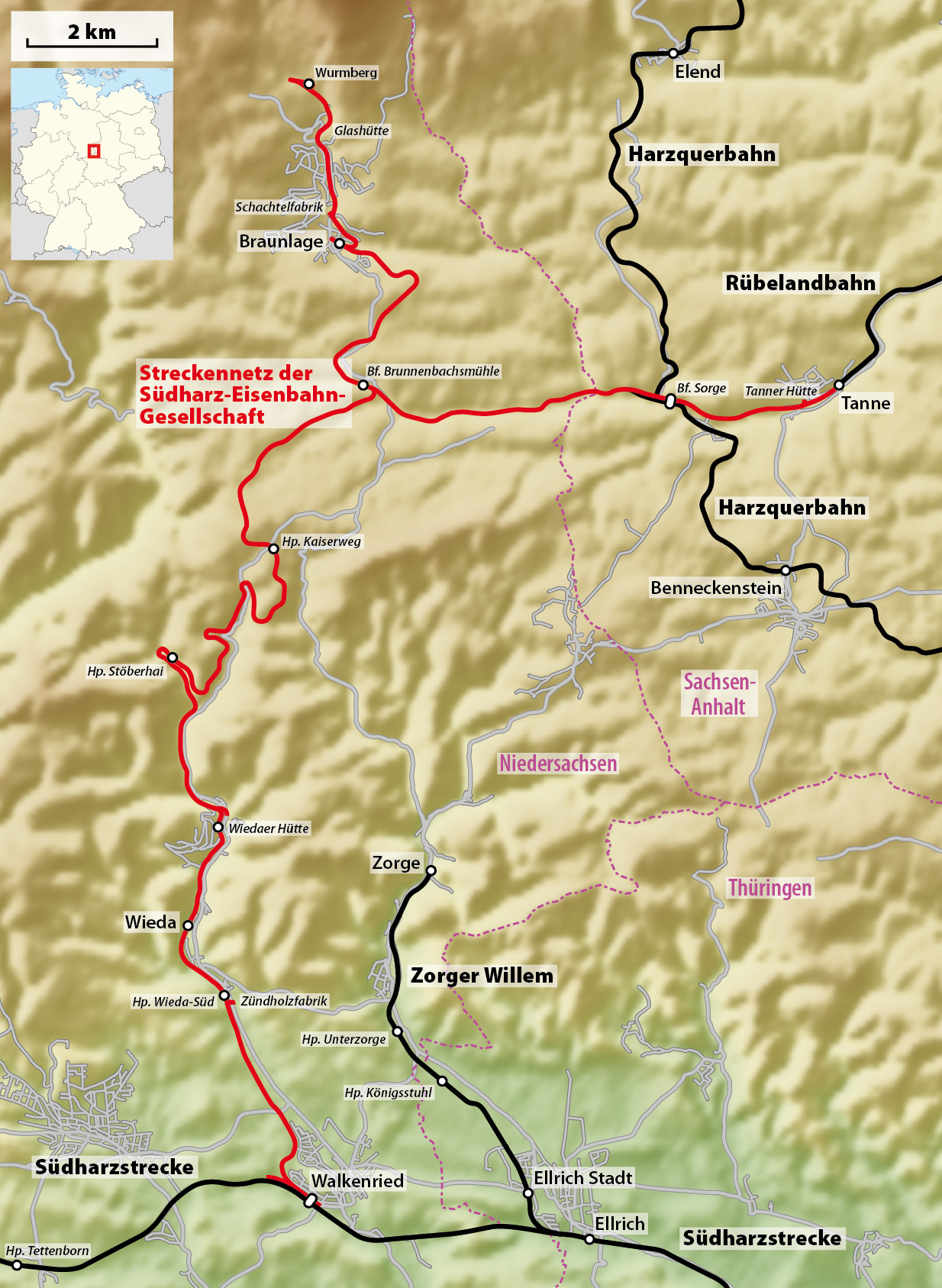 Streckenkarte der Südharz-Eisenbahn-Gesellschaft